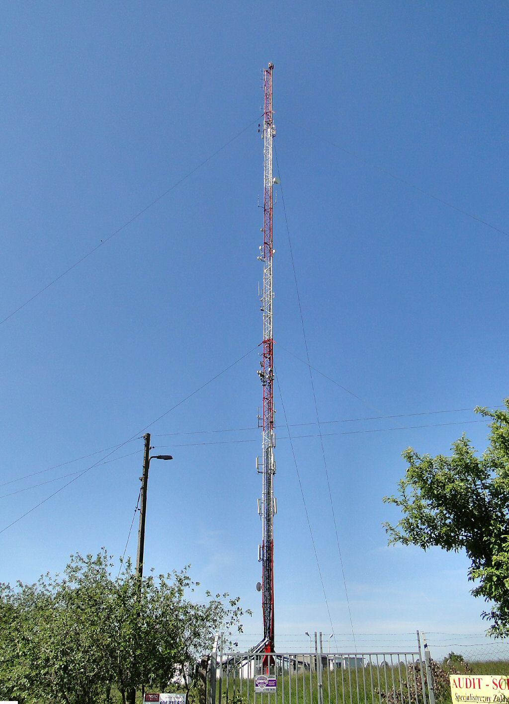 Szczecin Warszewo - maszt